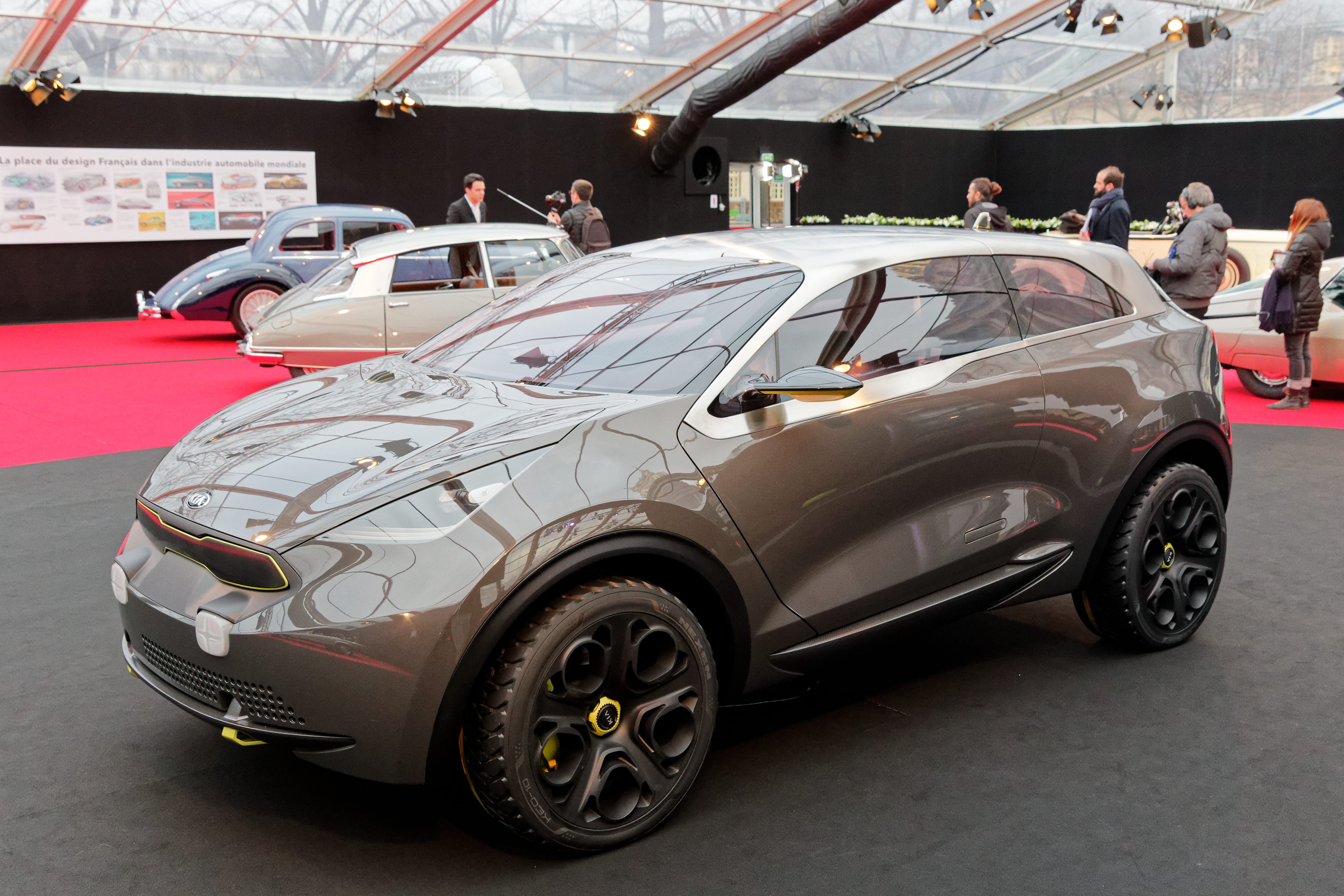 Un véhicule exposé lors du festival automobile international 2018.